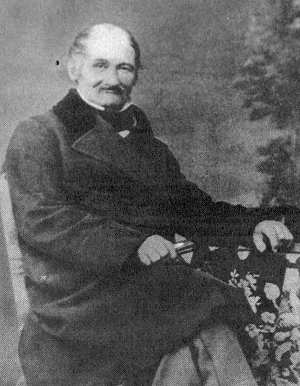 Portrait of Samuel Schnelle